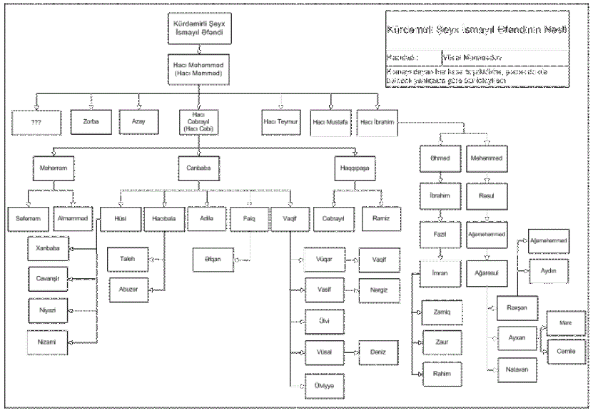 İsmayil Sirvaninin seceresi